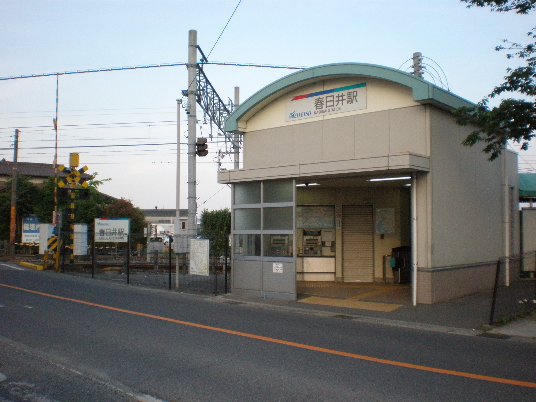 愛知県春日井市にある春日井駅（名鉄）